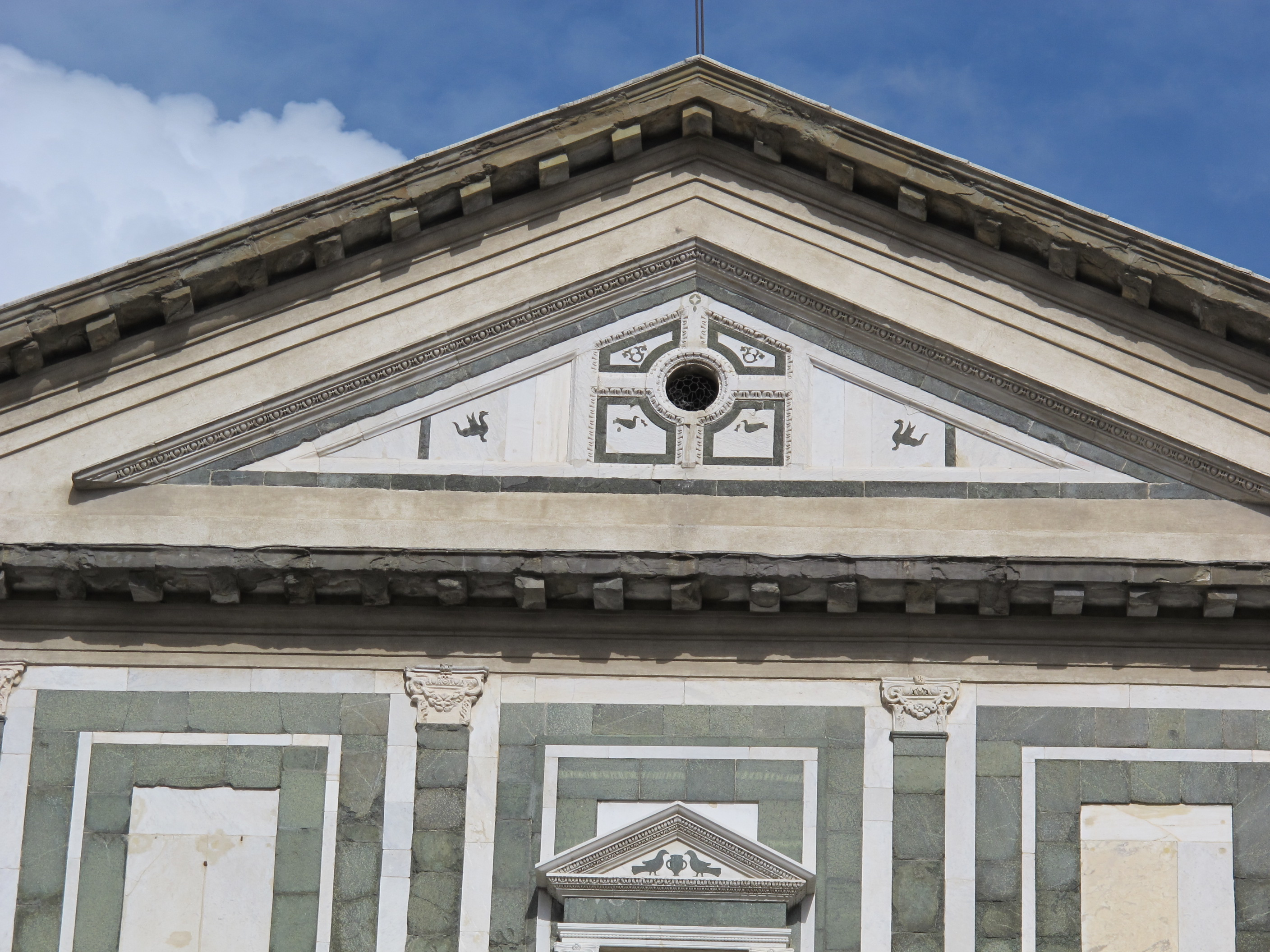 Empoli, collegiata